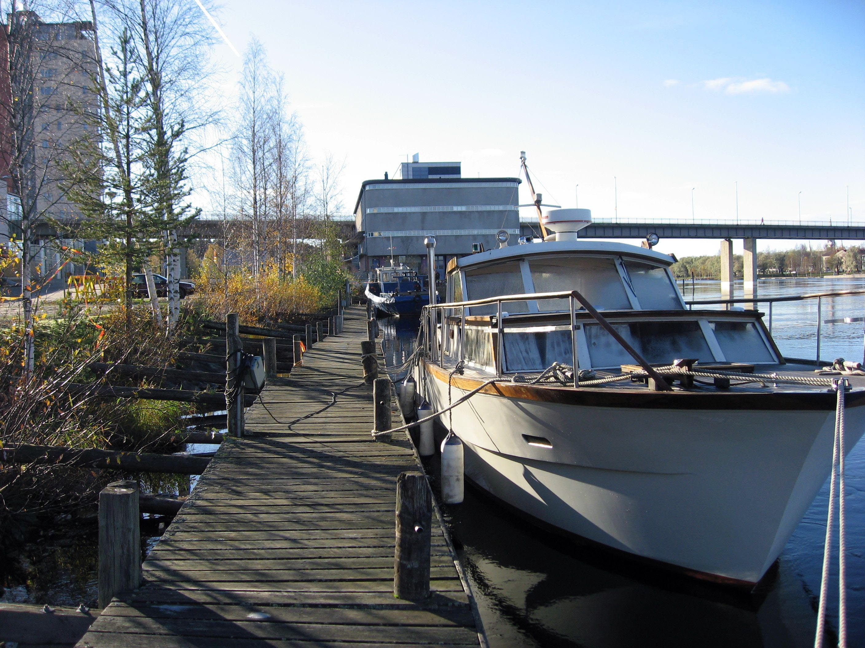 Penttilä Pielisjoki Joensuu